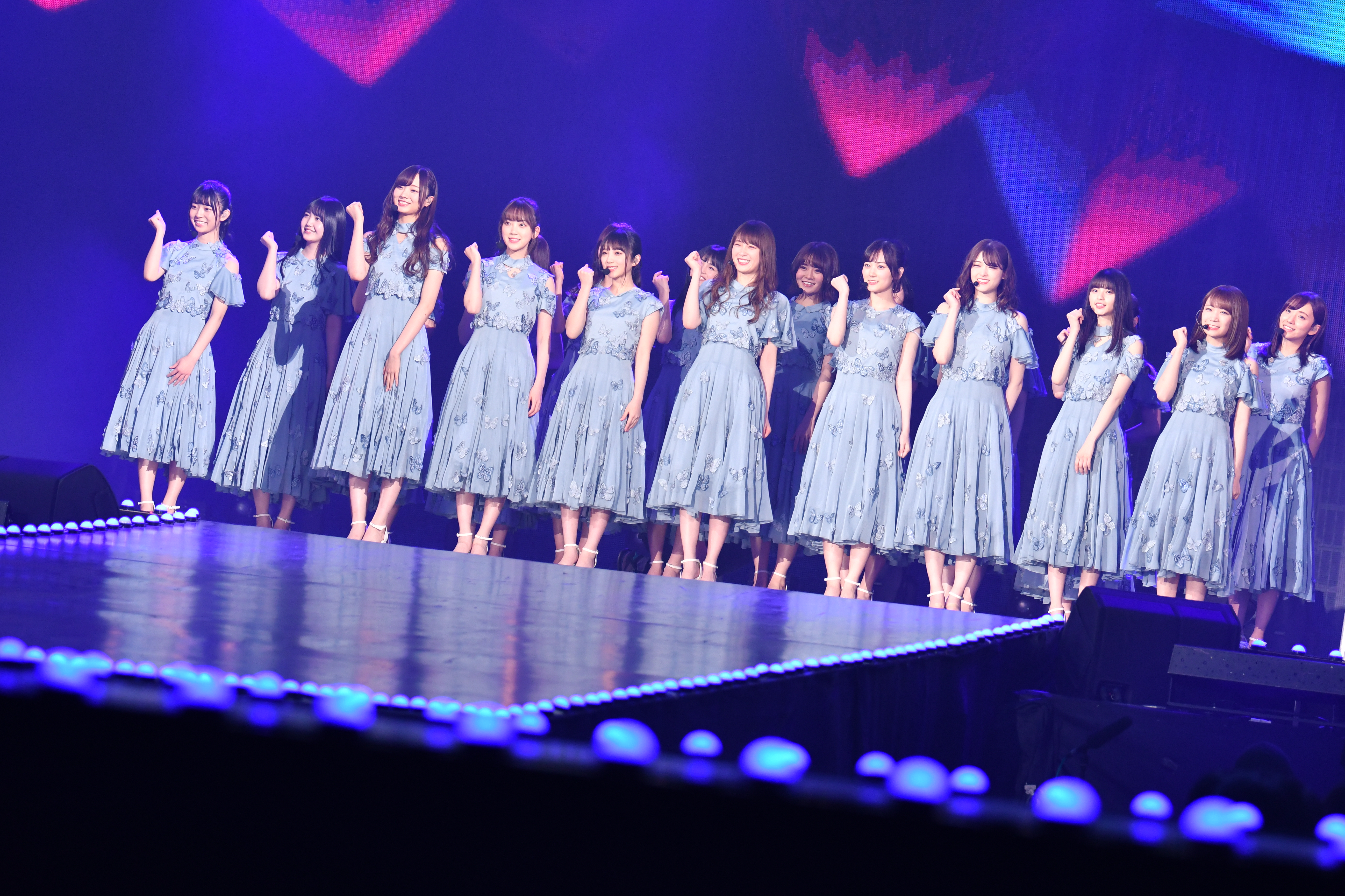 2019.01.26「第14回 KKBOX MUSIC AWARDS in Taiwan」乃木坂46 @台北小巨蛋